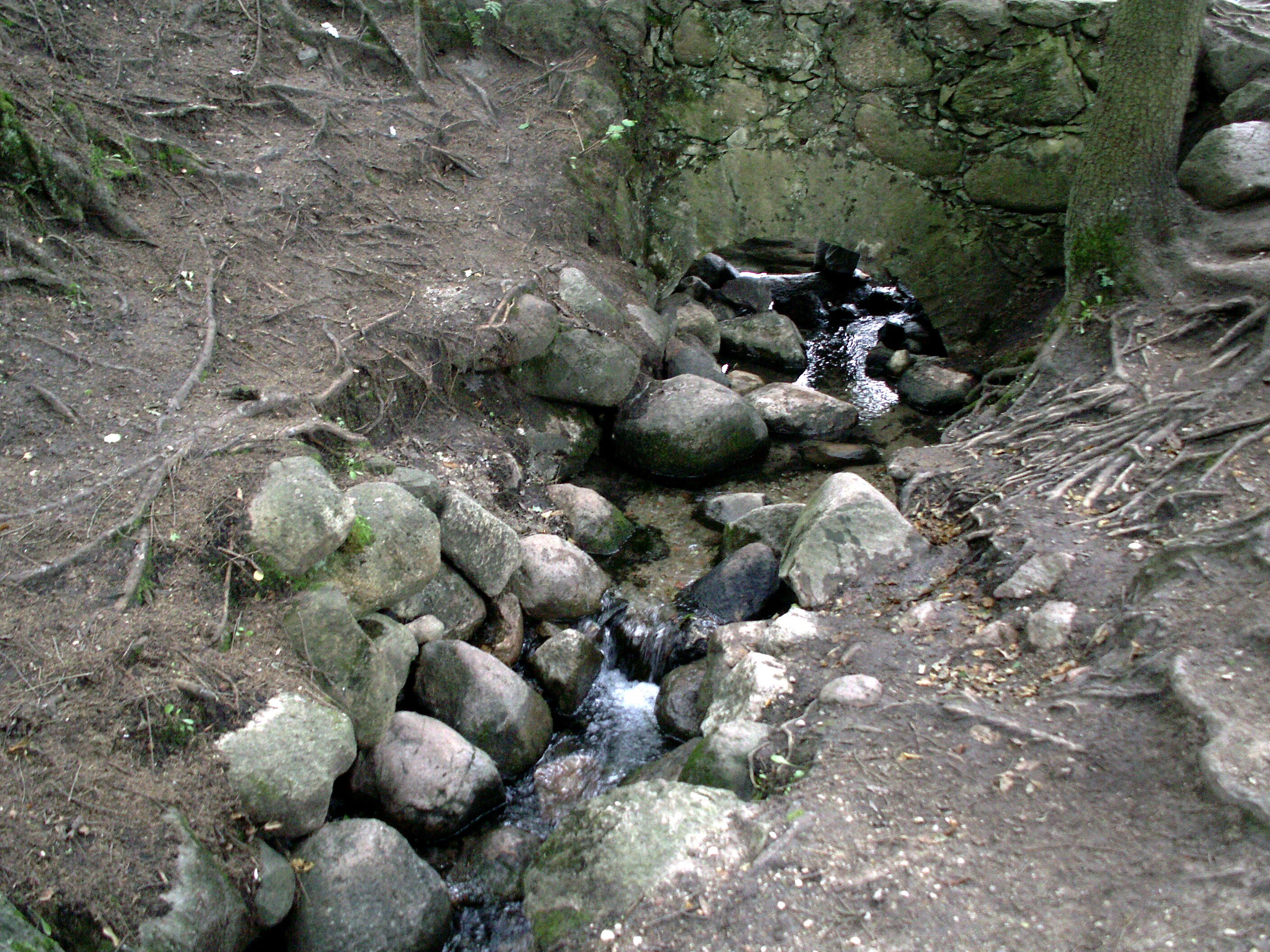 Kevelės šaltiniai, Vytinių pagastas, Latvija